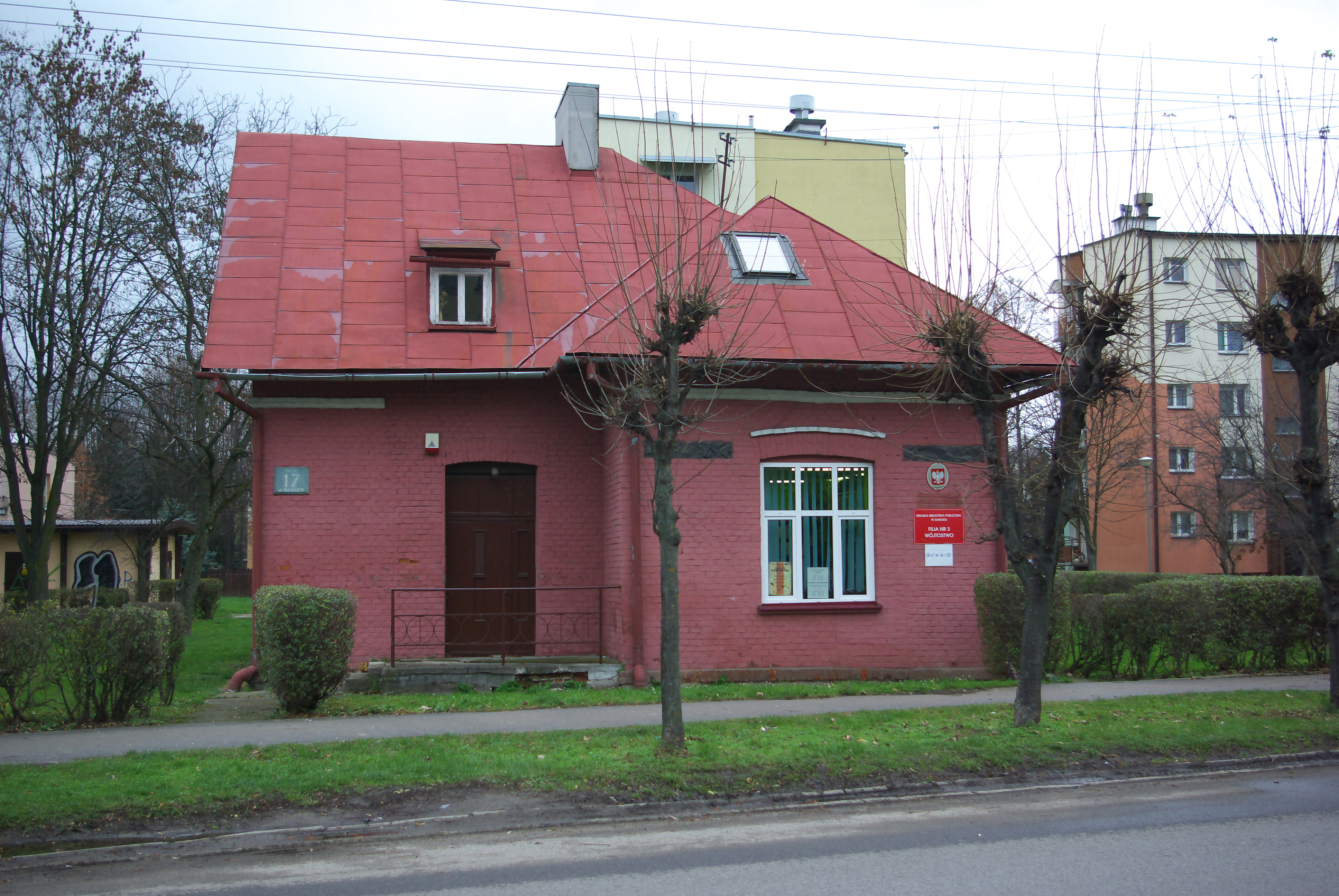 Budynek przy ulicy Traugutta 17 w Sanoku